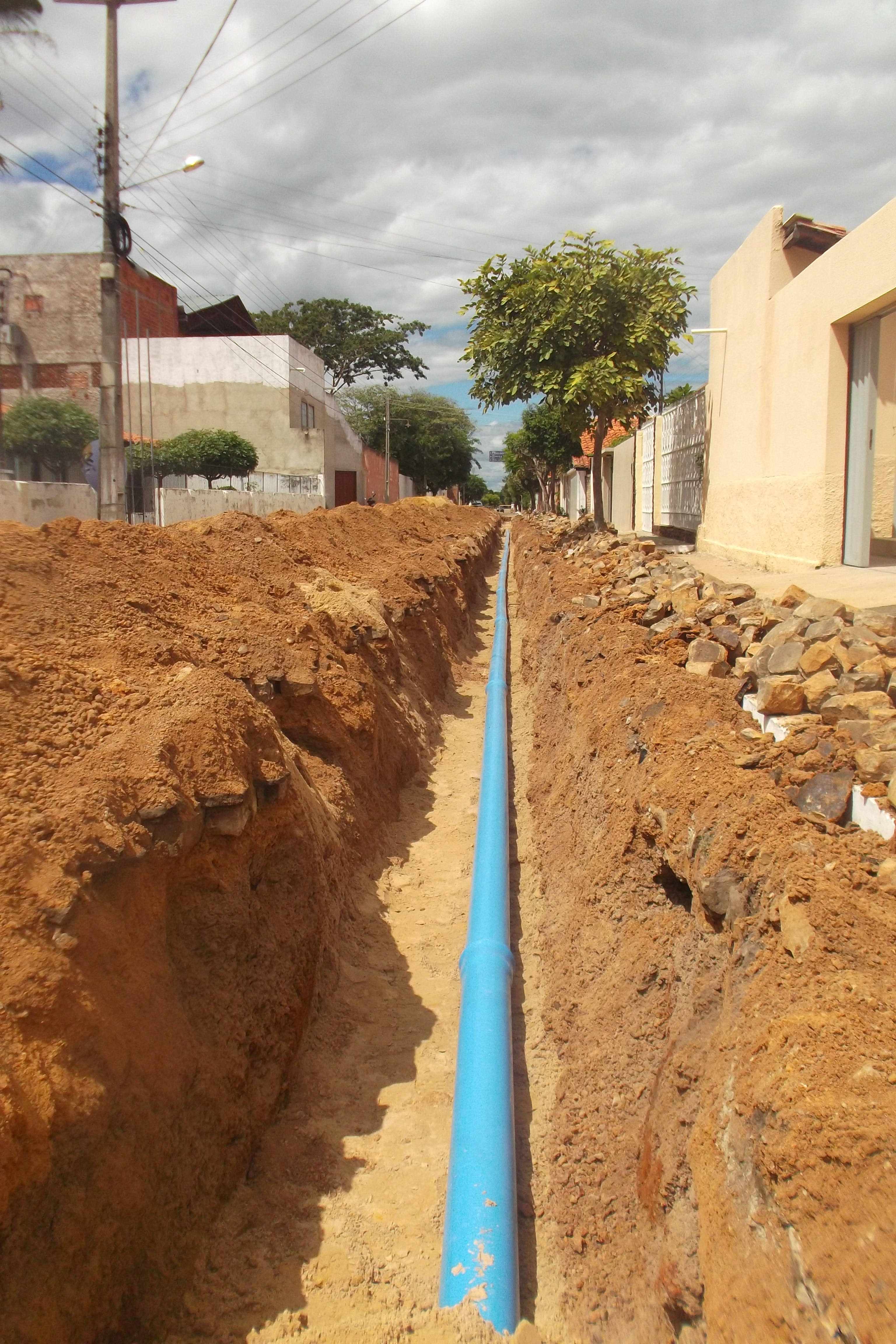 Engenharia de serviço de encanação para abastecimento de água.